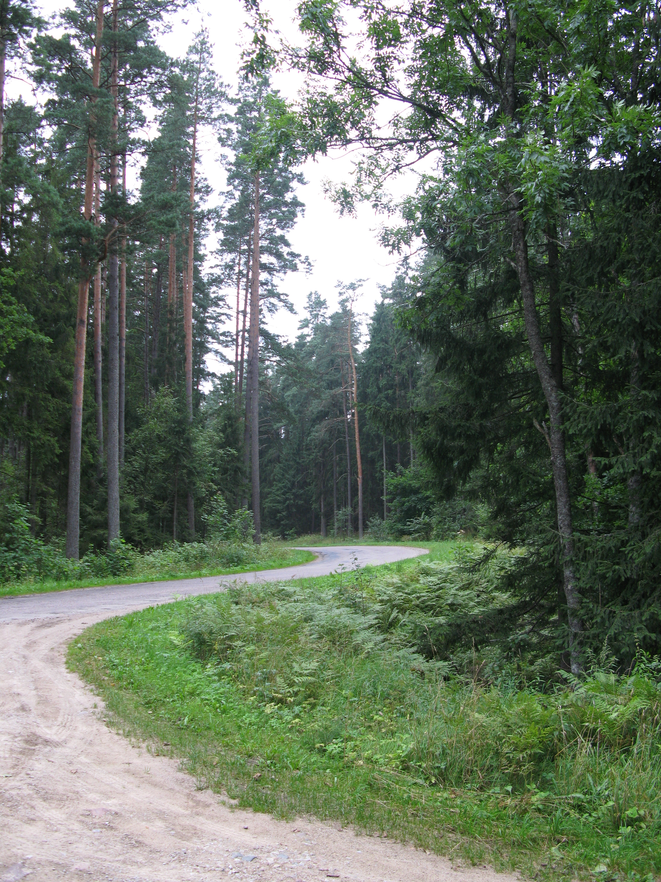 Puszcza Romincka, powiat gołdapski